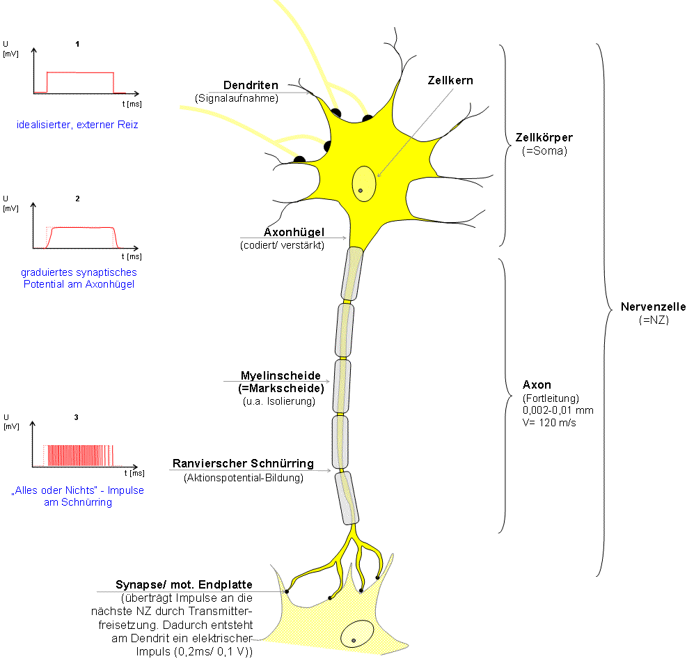 Impulsfortleitung an der Nervenzelle Quelle: selbst erstellt von H. Hoffmeister Zeichner: H. Hoffmeister (erstellt mit Word - wer die Vektorgrafik möchte, kann sich jederzeit melden) Datum: 14.12.2005